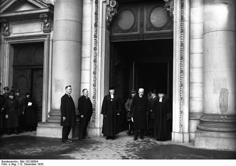 Reichspräsident von Hindenburg verläßt den Berliner Dom nach dem Gottesdienst zur Reichstagseröffnung am 12. Dezember 1933. Links neben ihm der Reichsbischof Müller und rechts Dompfarrer Doehring.